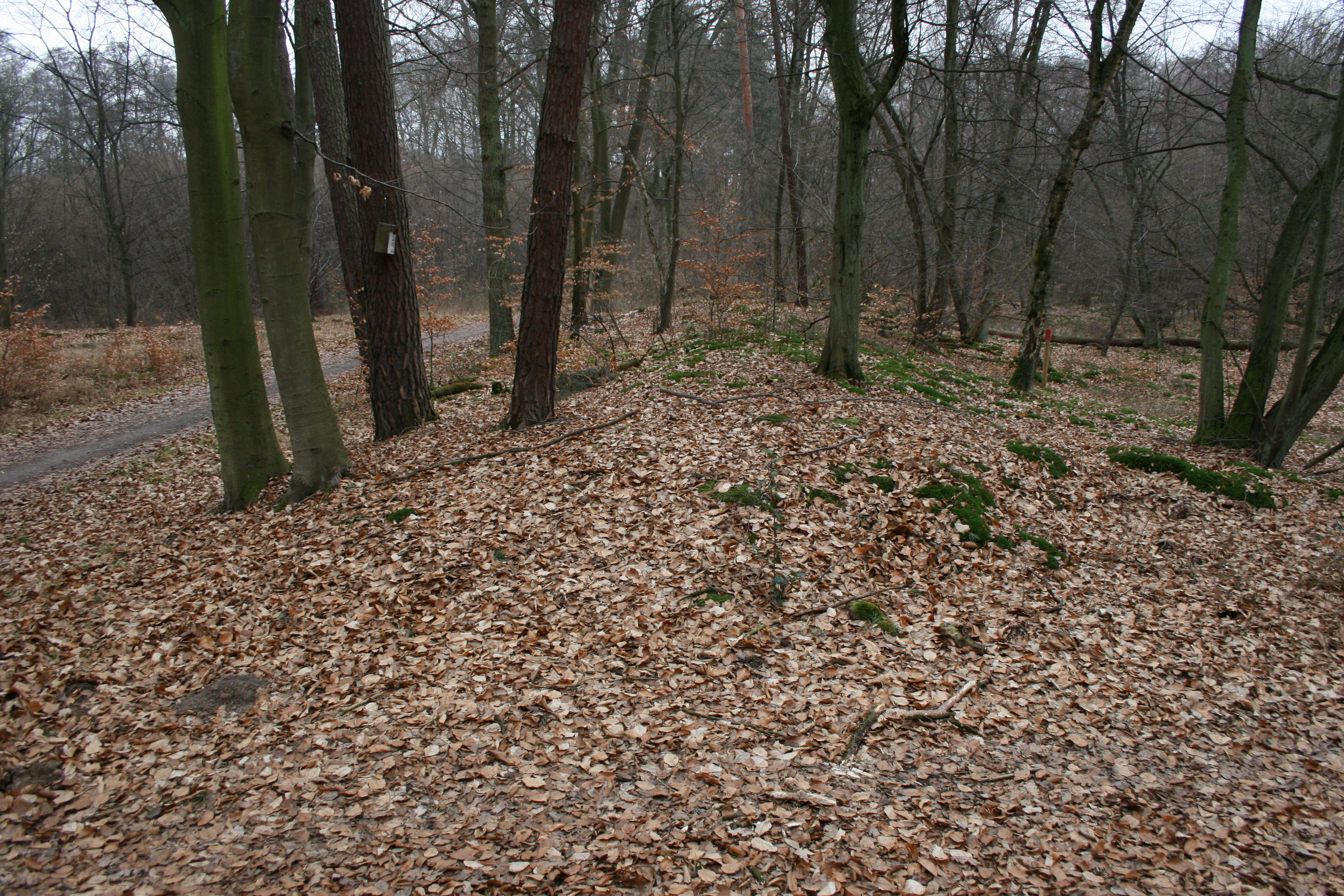 Der römische Limes nördlich des Großauheimer Torfbruchs zwischen Kleinkastell Neuwirtshaus und Kastell Großkrotzenburg. Blick nach Süden